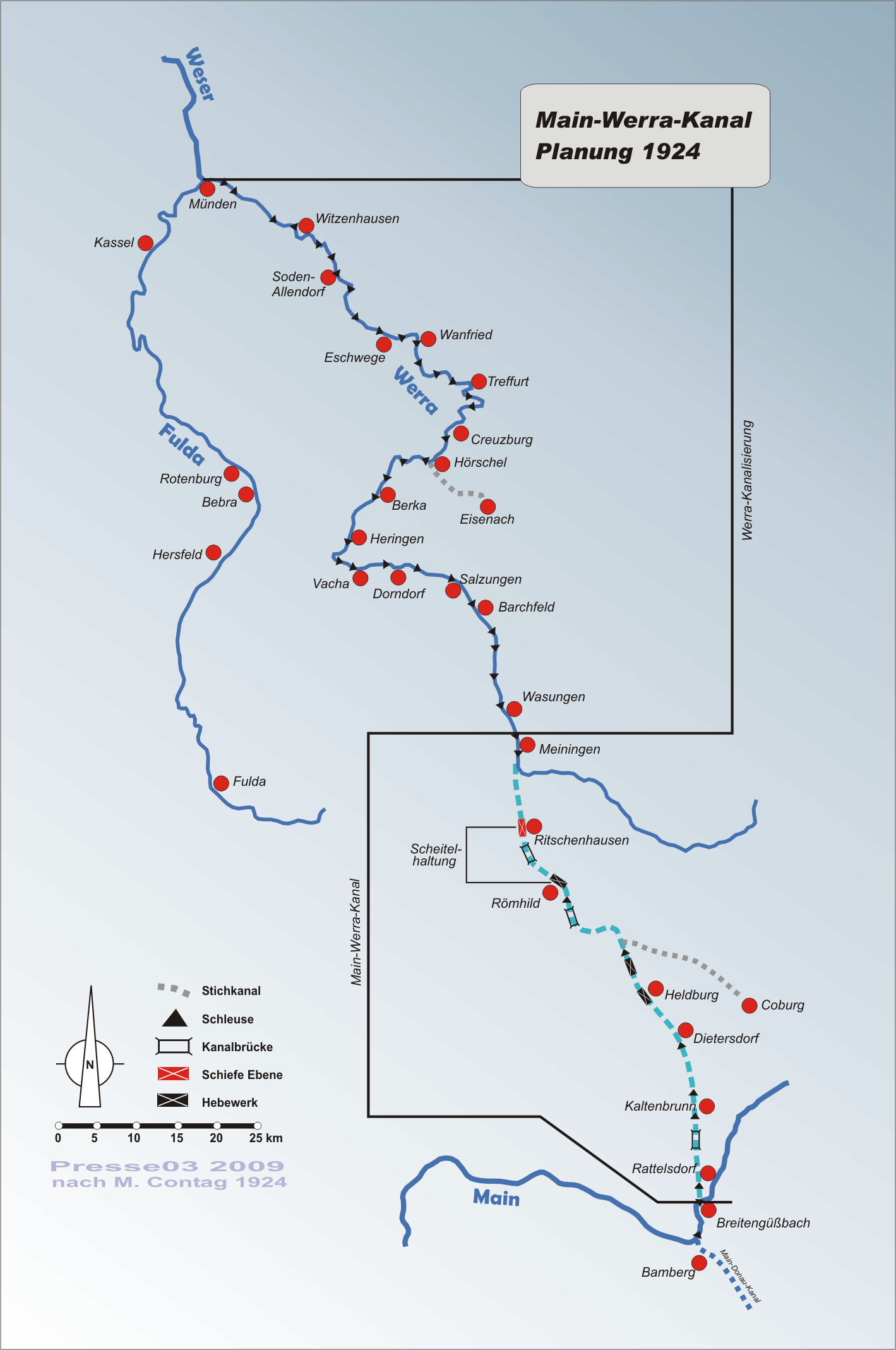 Plan des Main-Werra-Kanals aus dem Jahr 1924 von Max Contag